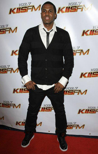 Jason Derulo en Kiss fm.